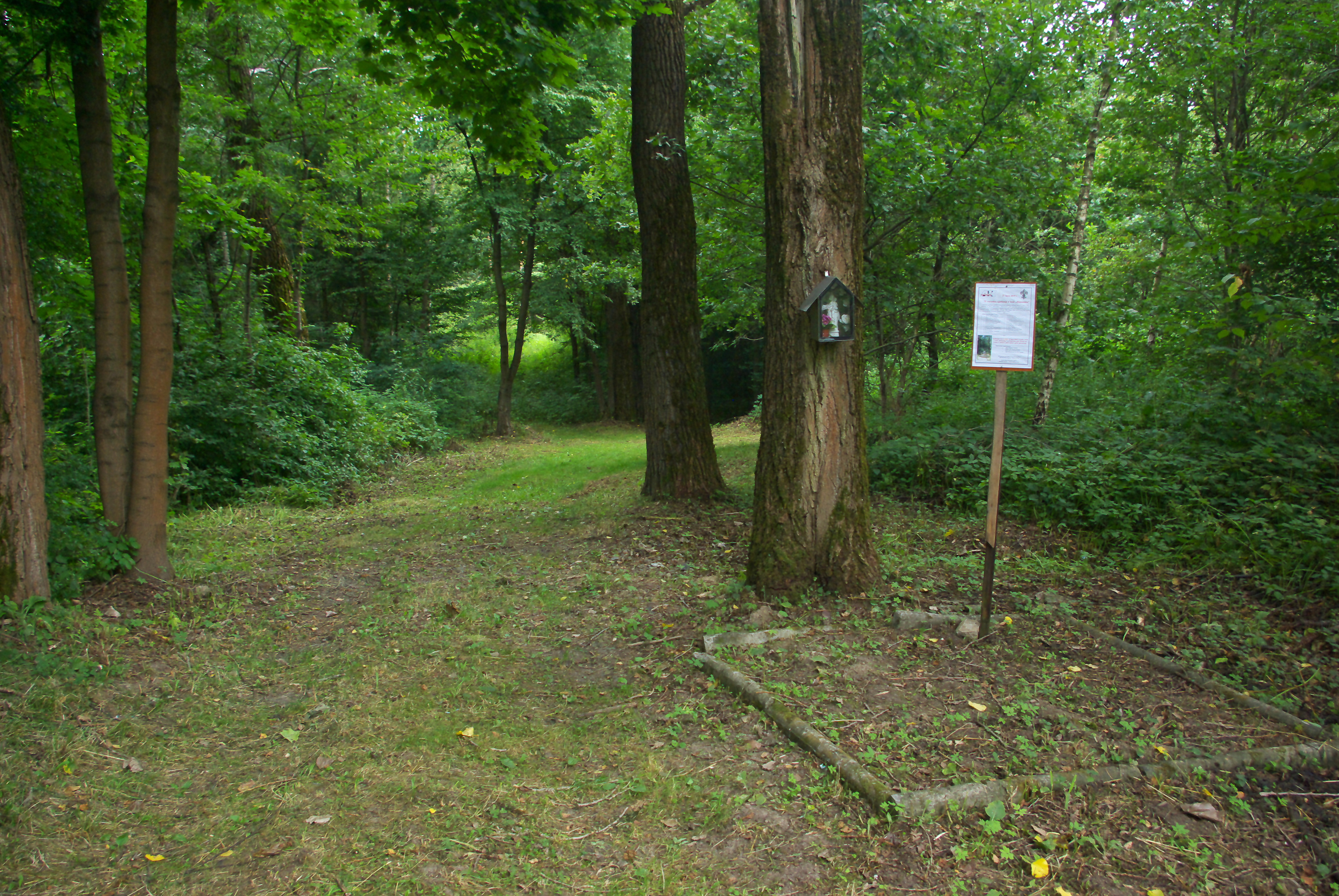 Miejsce pamięci w Hanusiskach pod Zagórzem, upamiętniające ofiary egzekucji dokonanej przez Niemców 27 lipca 1944. Zdjęcie z obchodów w dniu 27 lipca 2019.